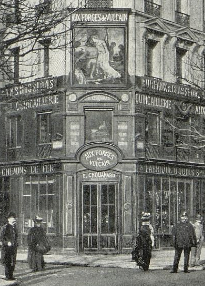 Enseigne "Aux Forges de Vulcain" réalisée par Auguste Jean au début des années 1870. Photographie. Collection privée.